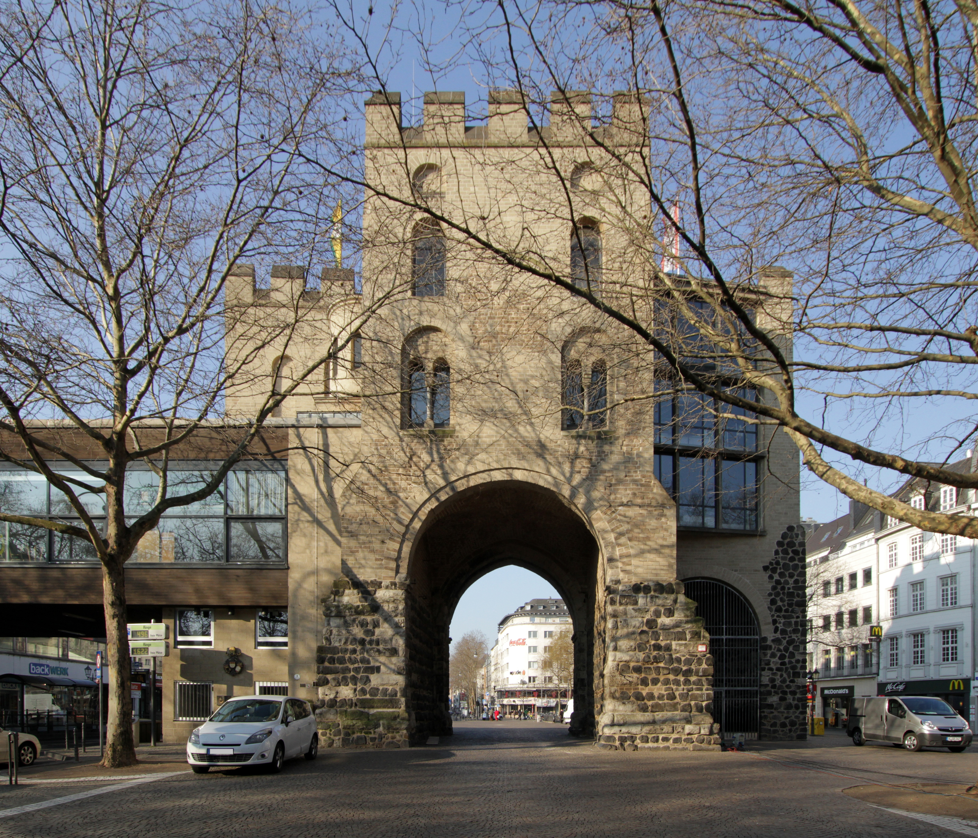 Hahnentorburg von Osten, Rudolfplatz, Köln This is a photograph of an architectural monument.